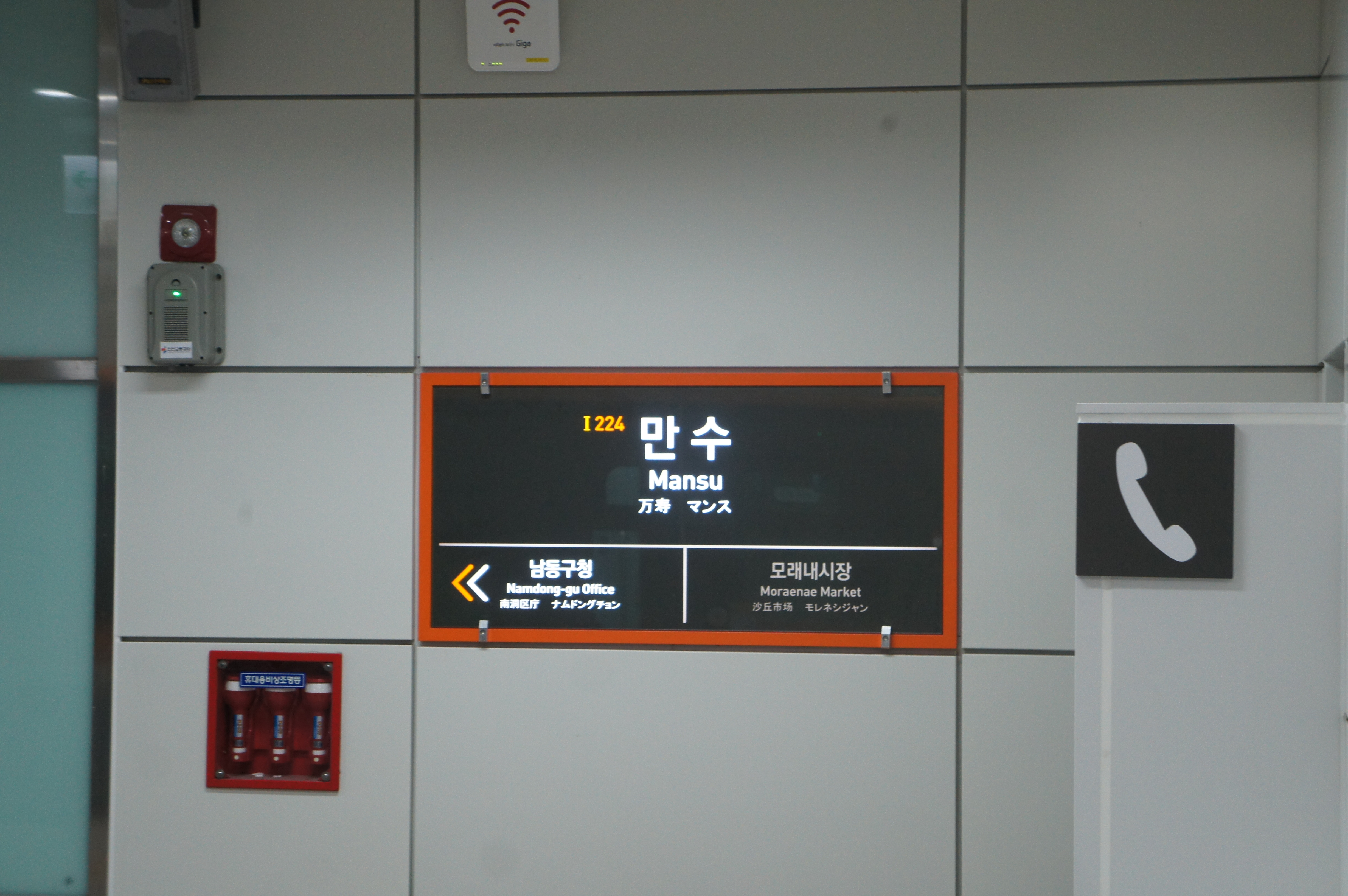 만수역 역명판